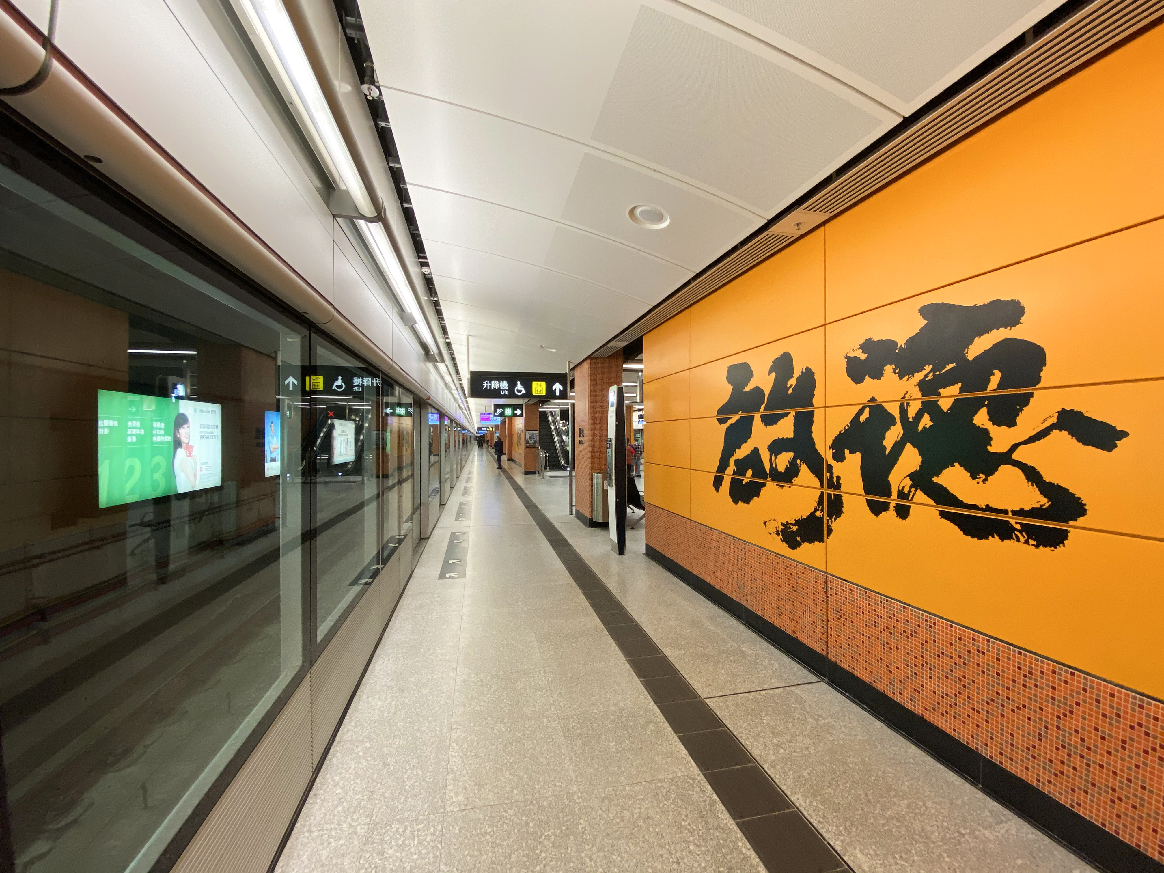 Kai Tak Station Platform